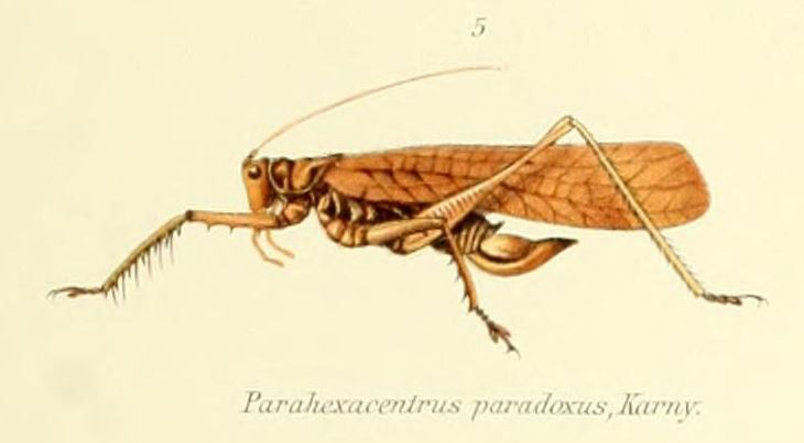 Orthoptera Parahexacentrus paradoxus (Karny, 1907)